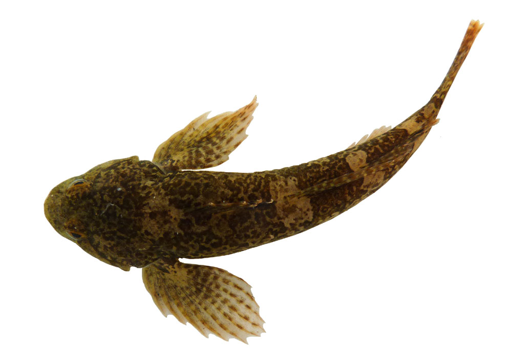 Chabot de l'Hérault (Cottus rondeleti) capturé lors d'une session de pêche électrique sur l'Avèze (Brissac, Hérault, France)